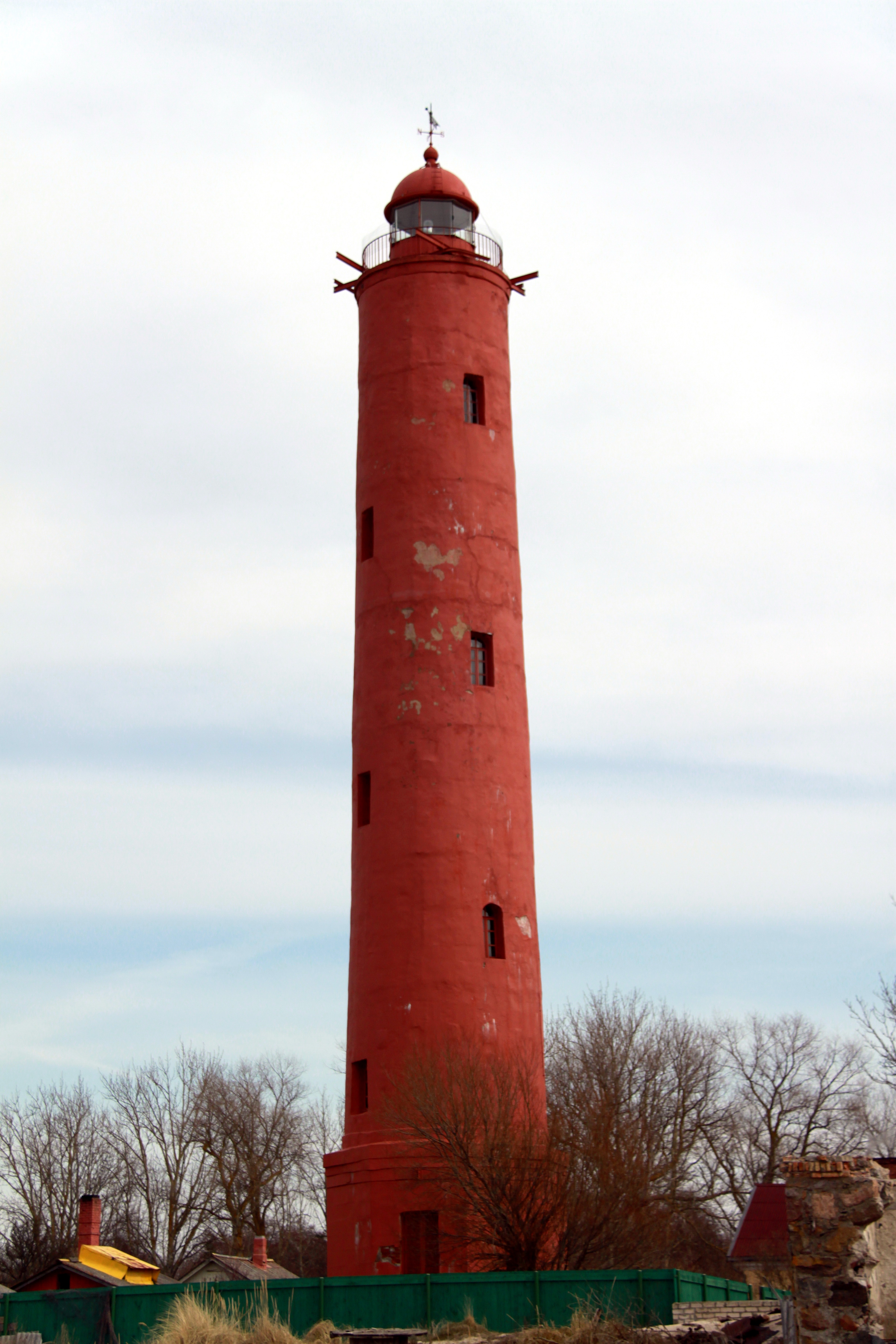 Akmeņrags